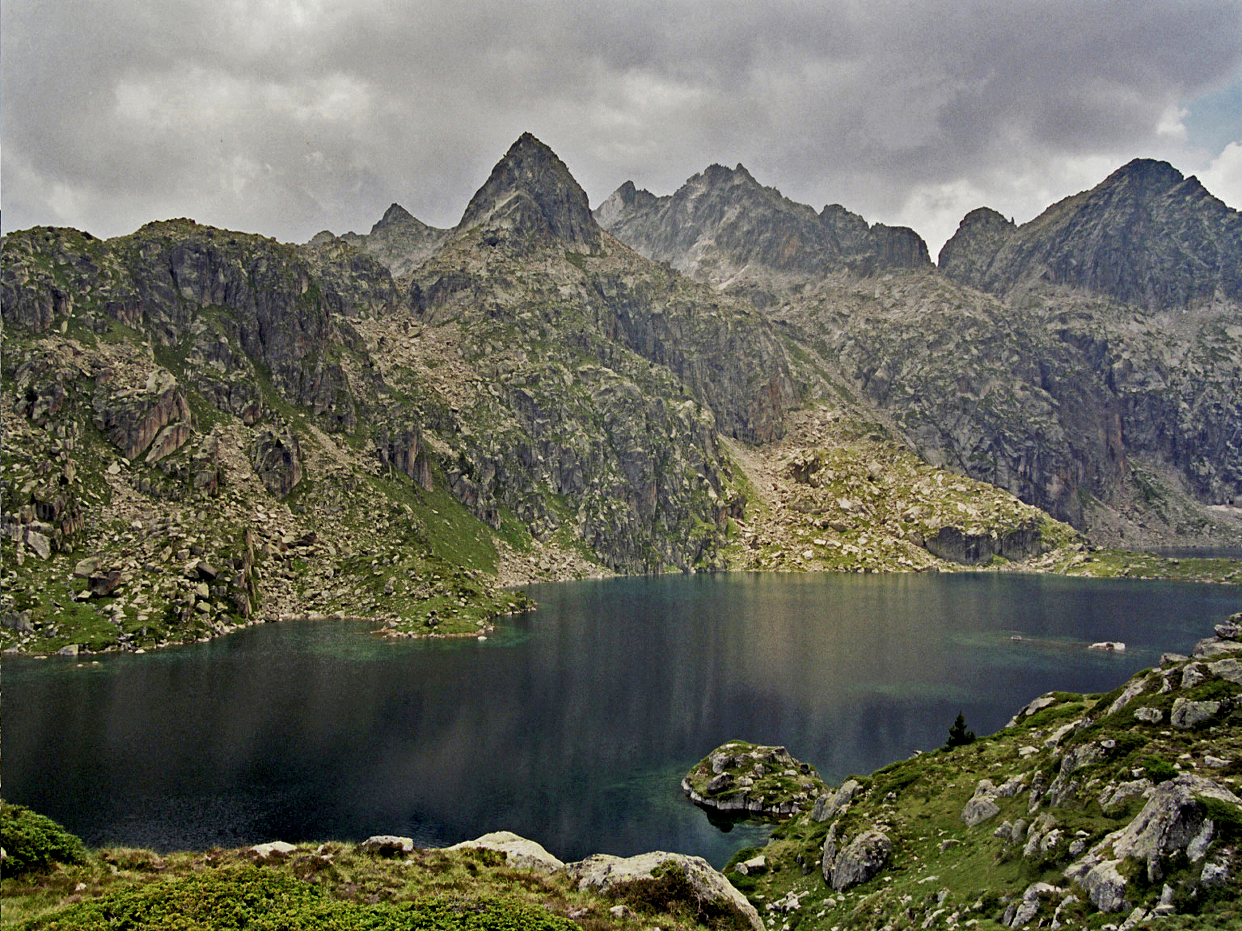 Estany Major de Saboredo This is a a photo of a wetland in Catalonia, Spain, with id: IZHC-99999999